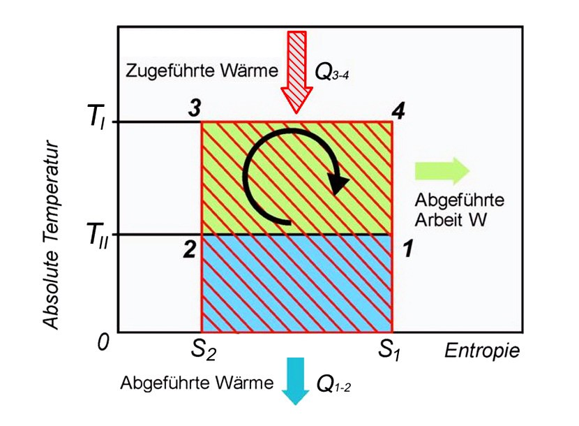 Der Carnotprozess im TS-Diagramm